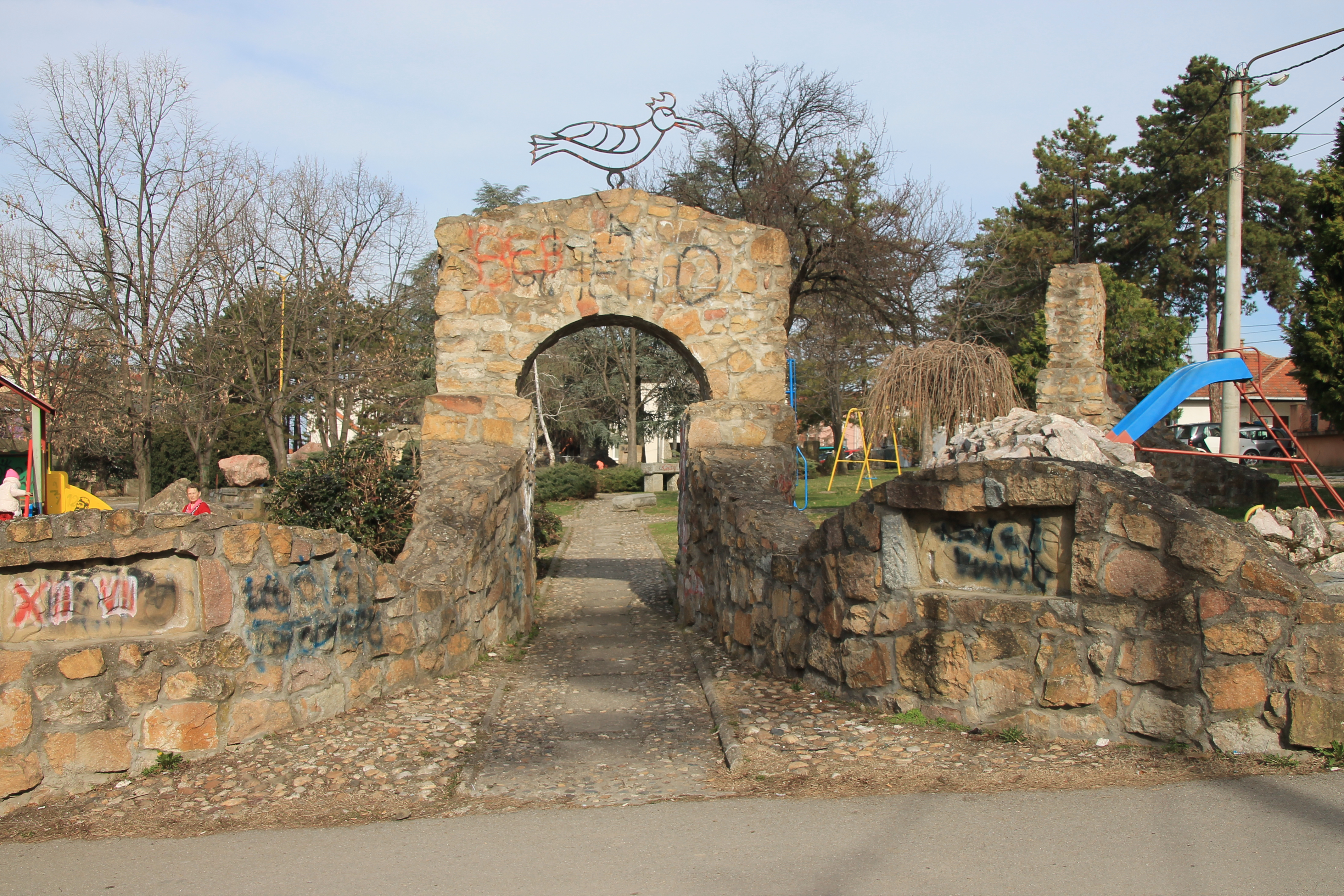 Kamengrad Lazarevac